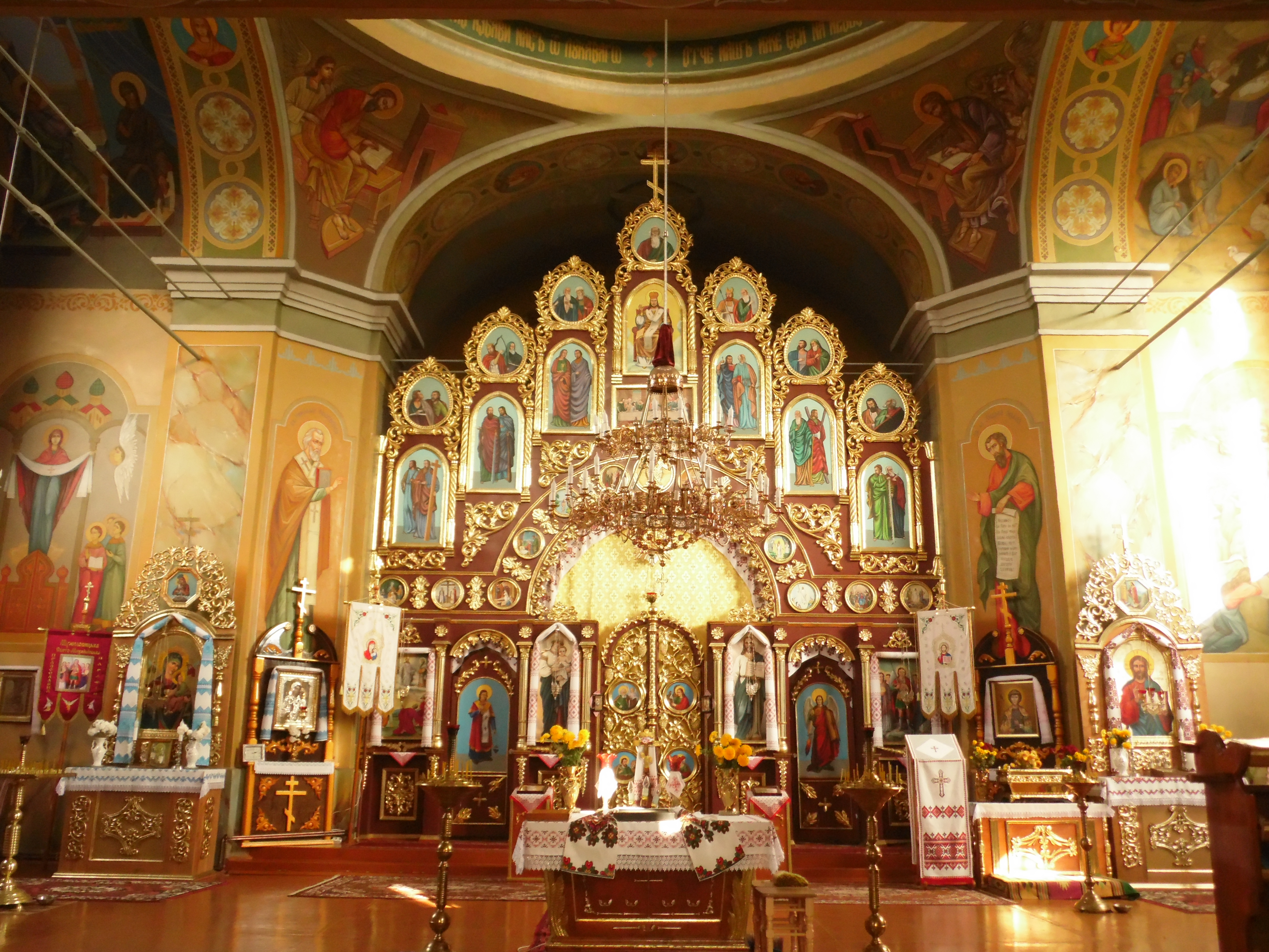 Інтер'єр православного храму с. Мужиловичі